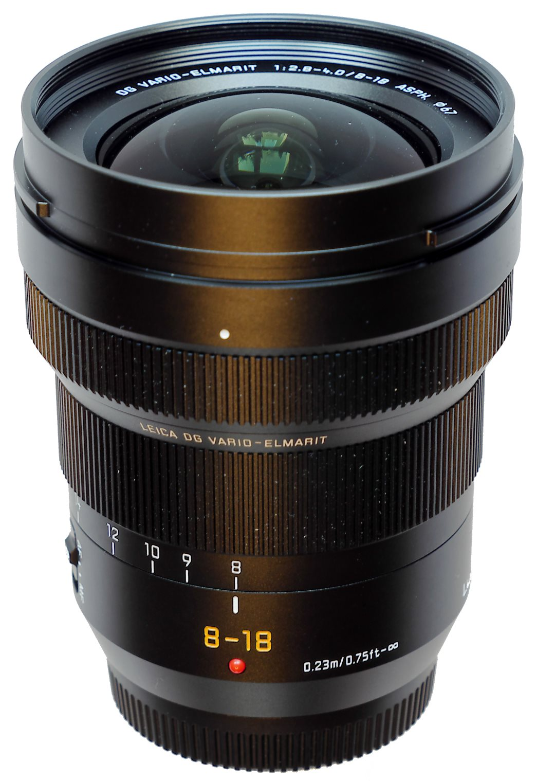 Durch automatisch Kompensation im Micro-Four-Thirds-System weitgehend verzeiichnungsfreies Zoomobjektiv im Ultraweitwinkelbereich mit einem Brennweitenbereich von 8 bis 18 Millimeter (kleinbildäquivalente Brennweiten von 16 bis 36 Millimeter)